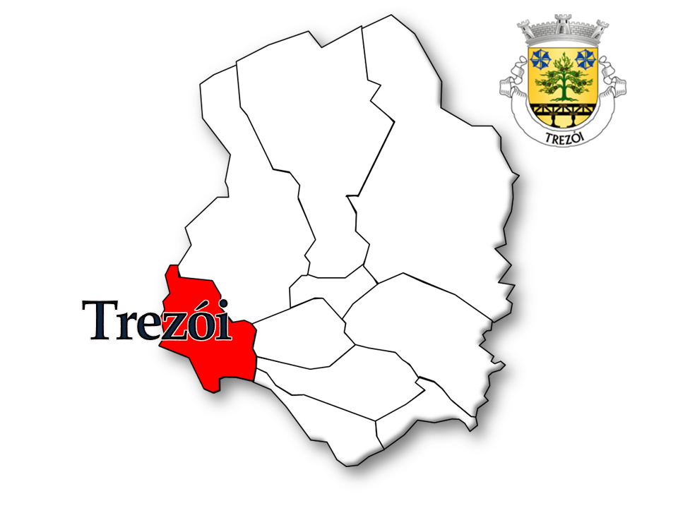 Evolução da População